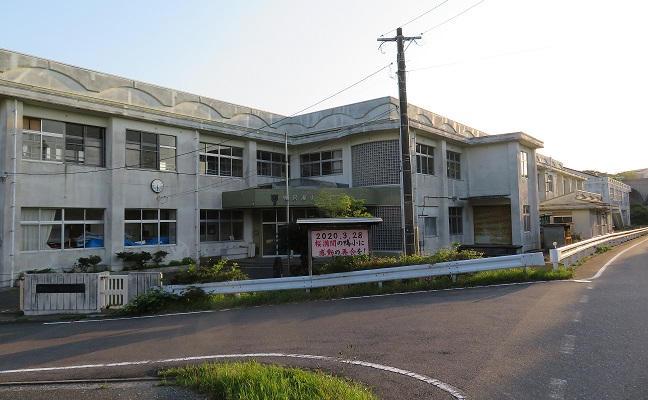 美津島町立鴨居瀬小学校跡（対馬市）